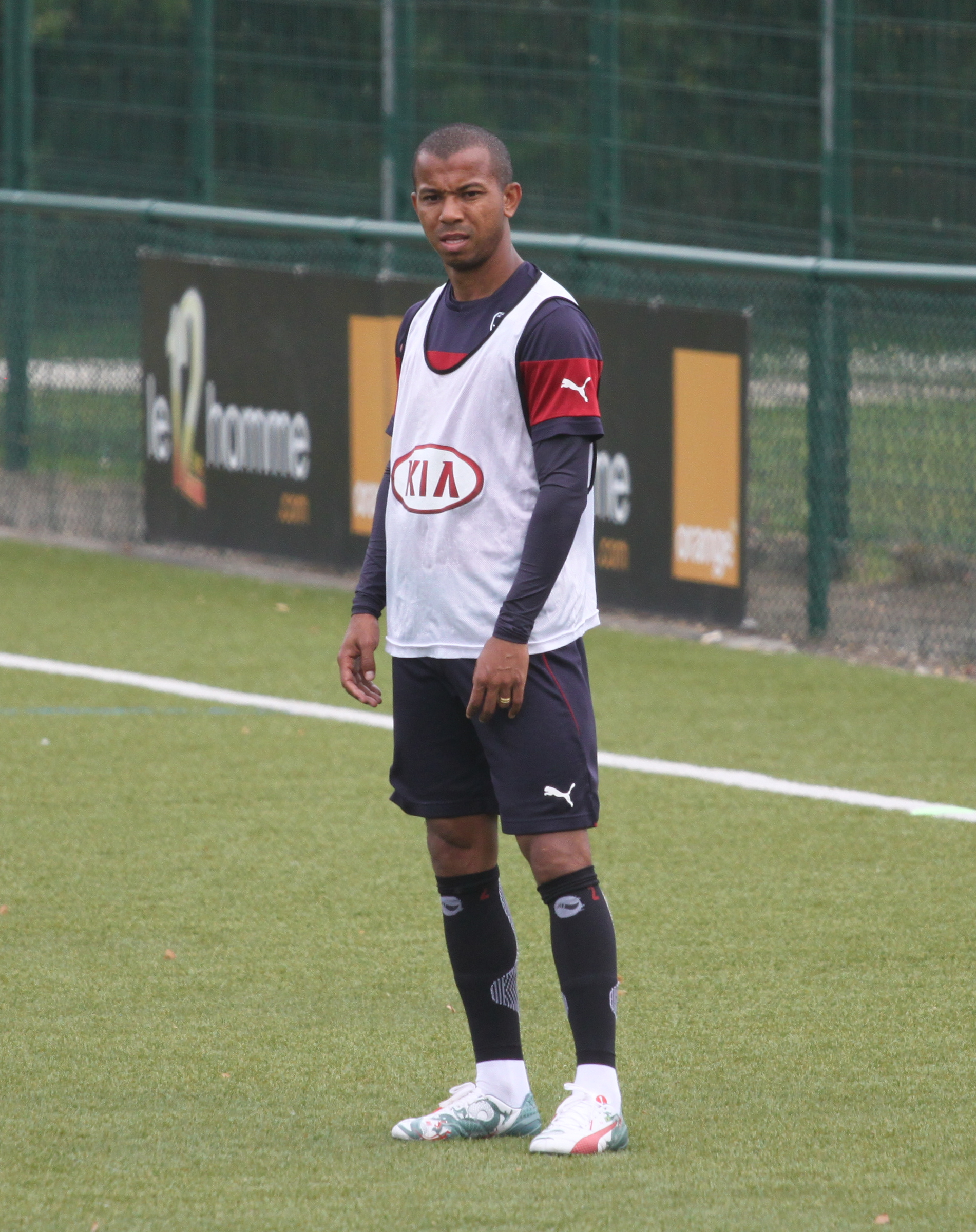 Mariano à l'entraînement.